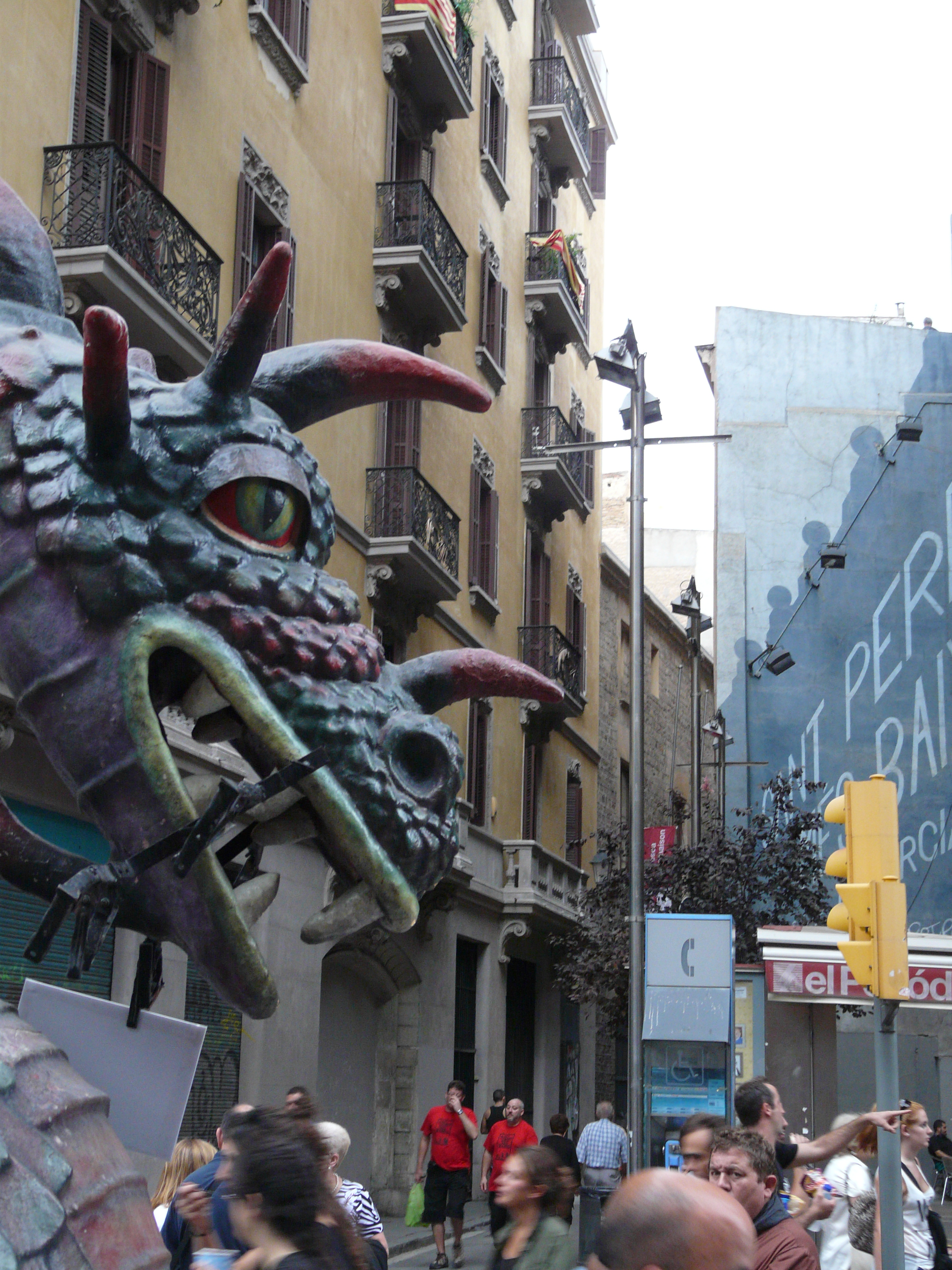 Imatge presa durant la tarda del diumenge 23 de setembre a les festes de la Mercè del 2012